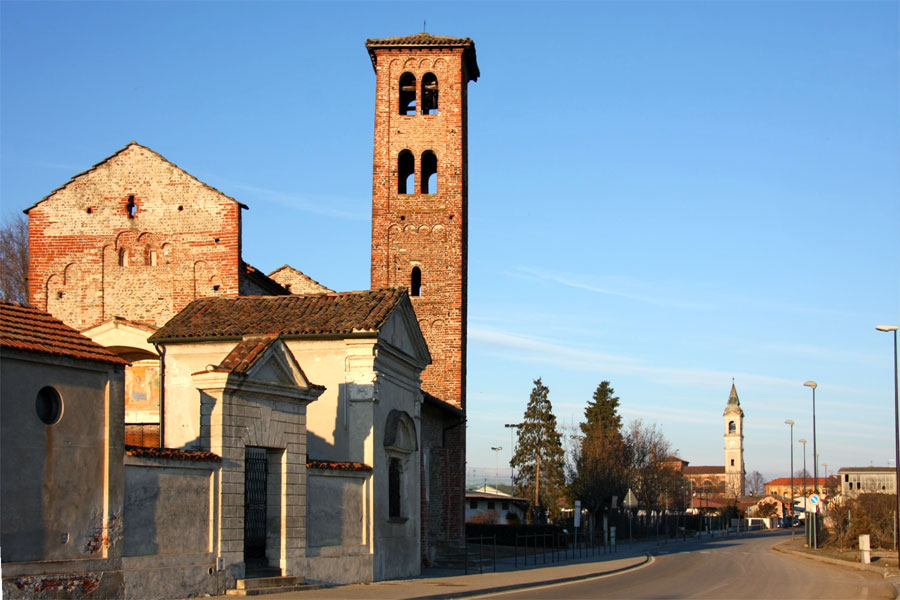 Veduta di Casalvolone (NO) con in primo piano la pieve di San Pietro ed alle spalle l'abitato con la chiesa parrocchiale